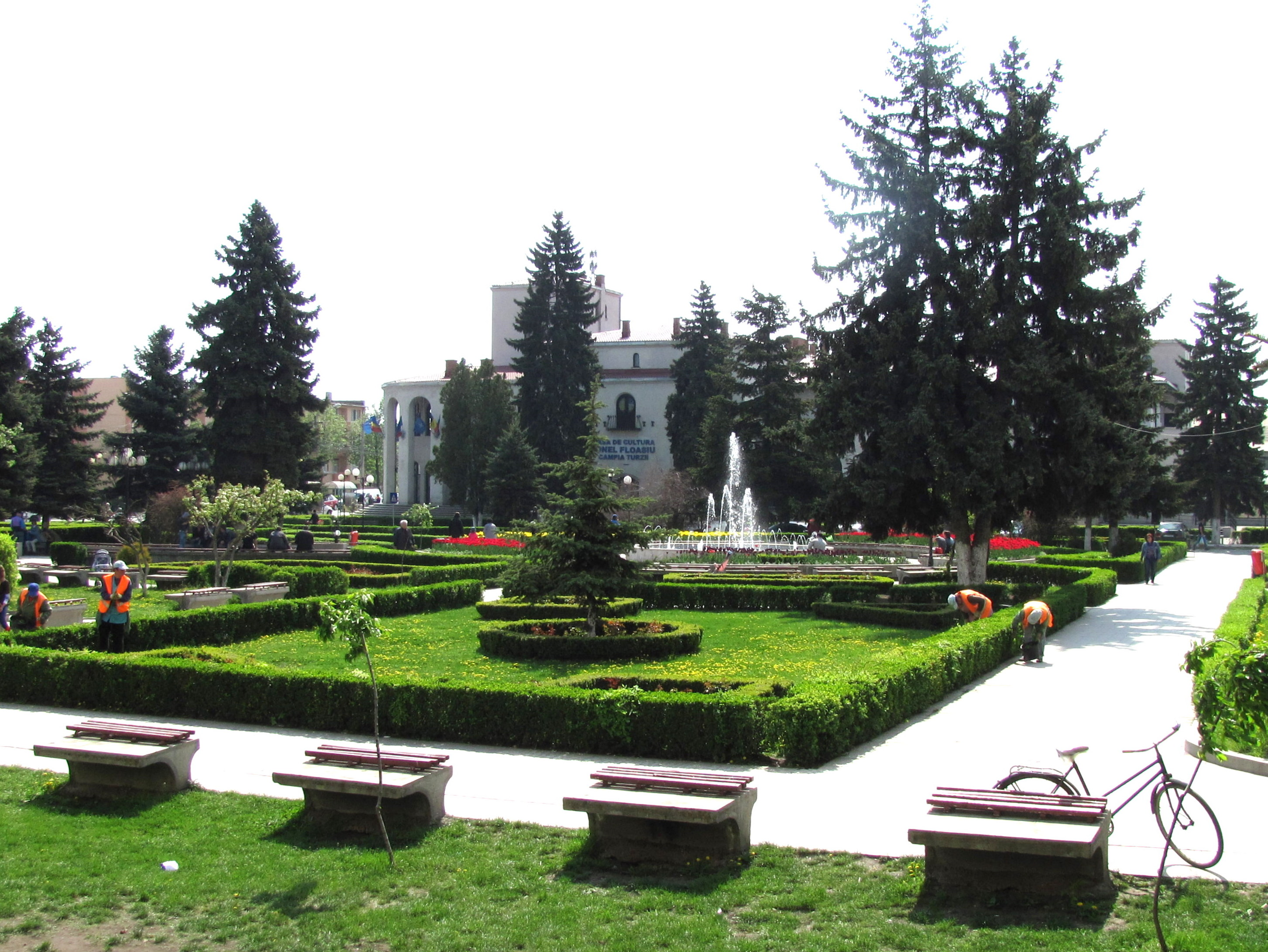 Câmpia Turzii, parcul din centrul orasului